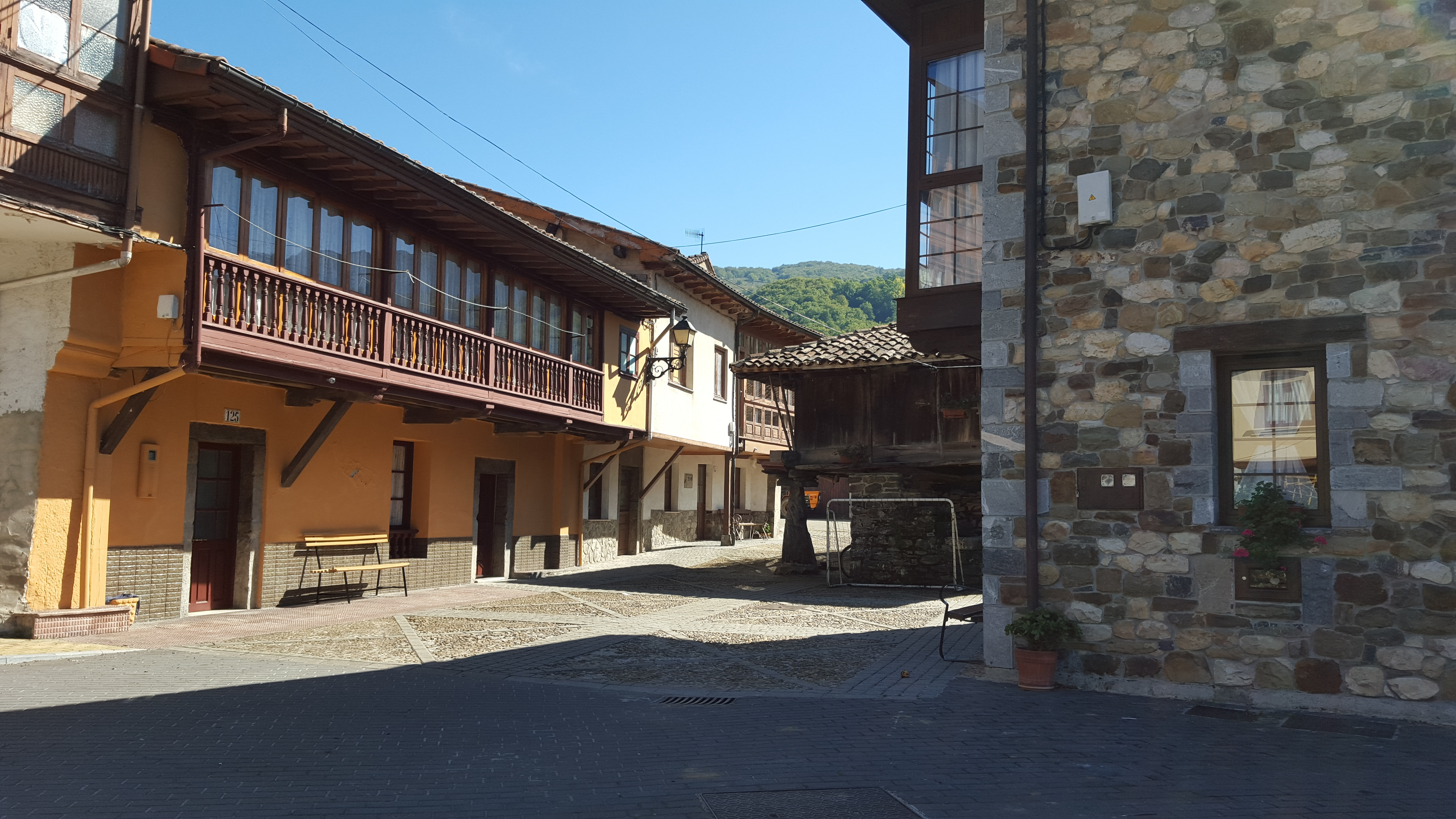 Sobrescobio, Premio Príncipe de Asturias Pueblo Ejemplar 2009